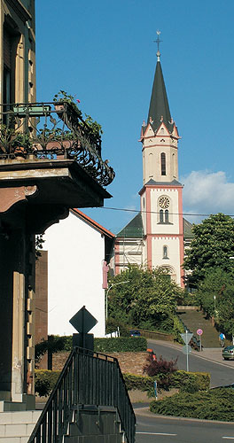 Die katholische Kirche von Bous, eine typische Ansicht der Gemeinde Bous. Im Vordergrund der Platz um das Kriegerdenkmal mit Kirchstraße